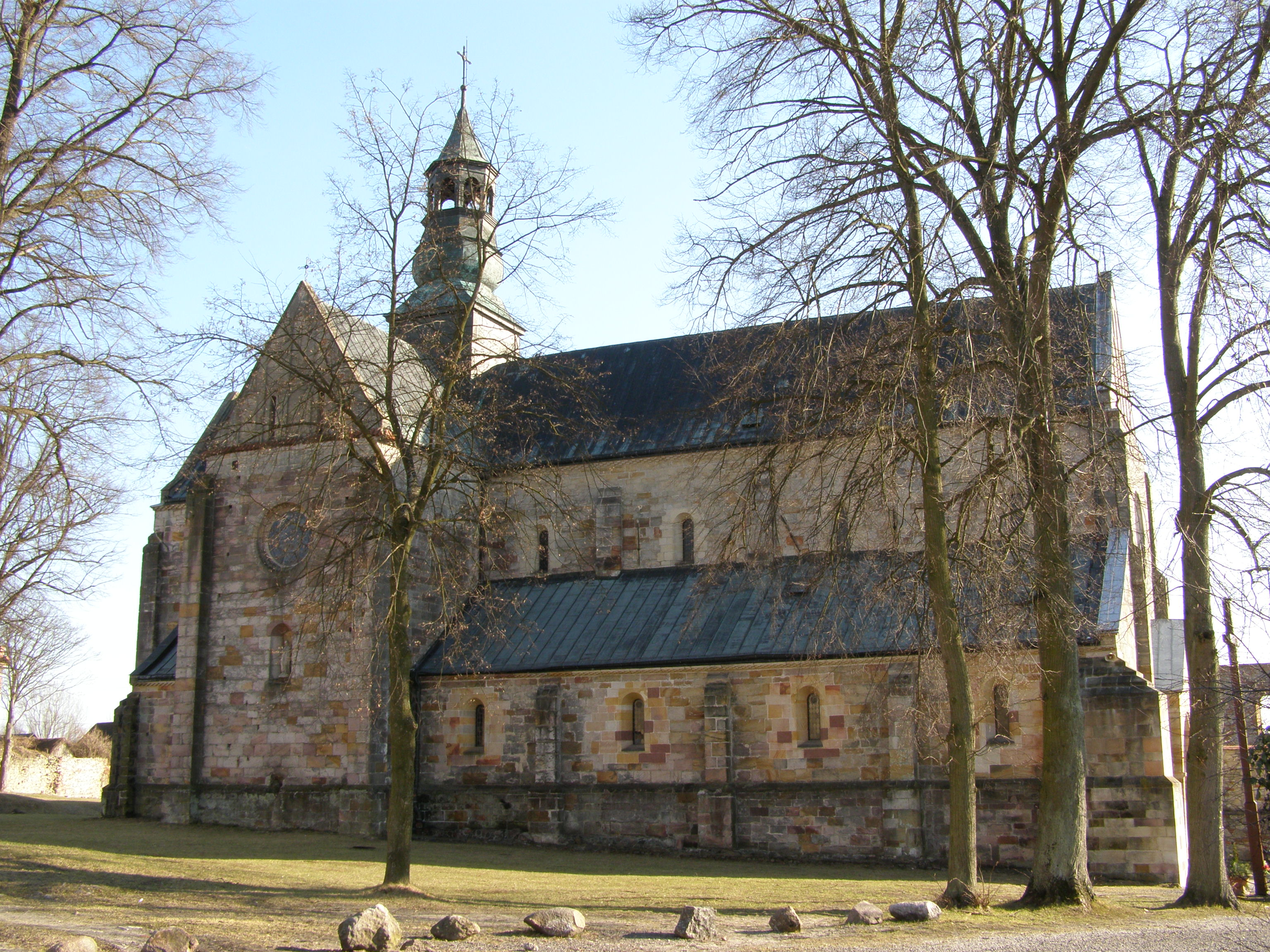 Kościół pw. Tomasza Kantuaryjskiego w opactwie cystersów w Sulejowie